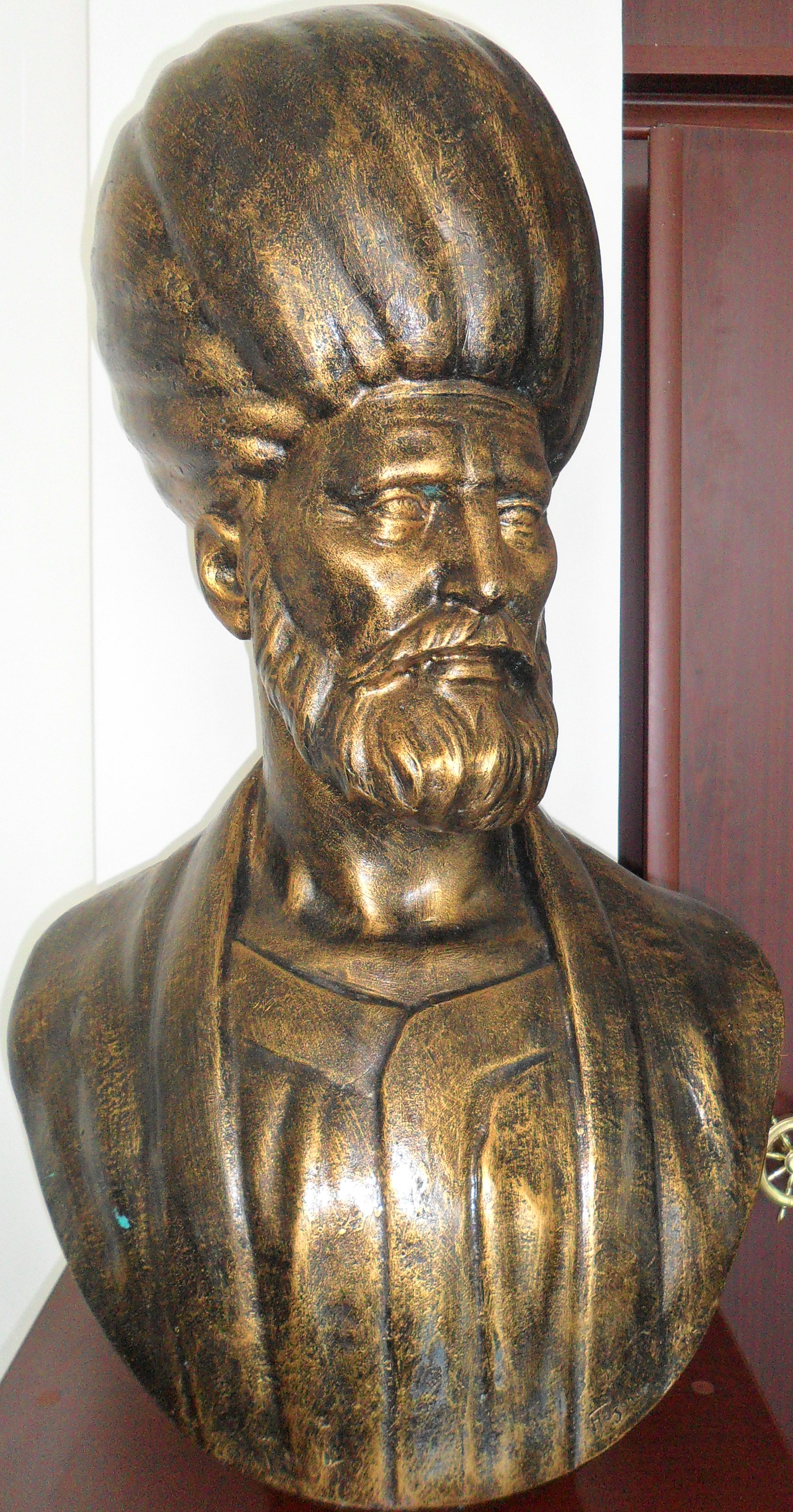 Mersin Deniz Müzesinde bulunan Pîrî Reis büstü.